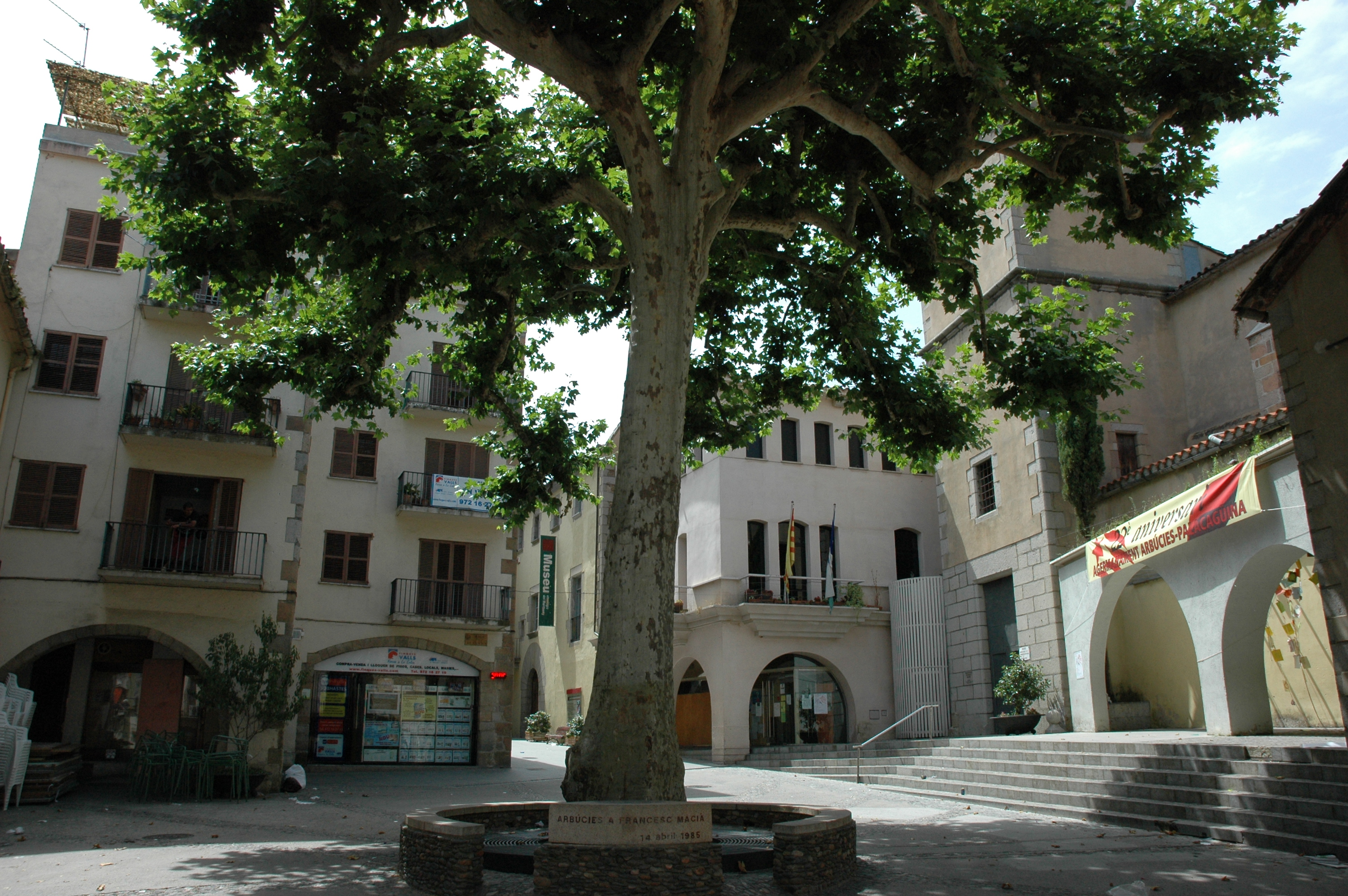 Arbúcies This is a a photo of a protected or outstanding tree in Catalonia, Spain, with id: MA-34.009.01